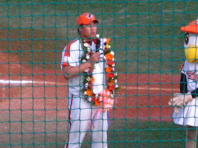 한화 이글스 투수 류현진